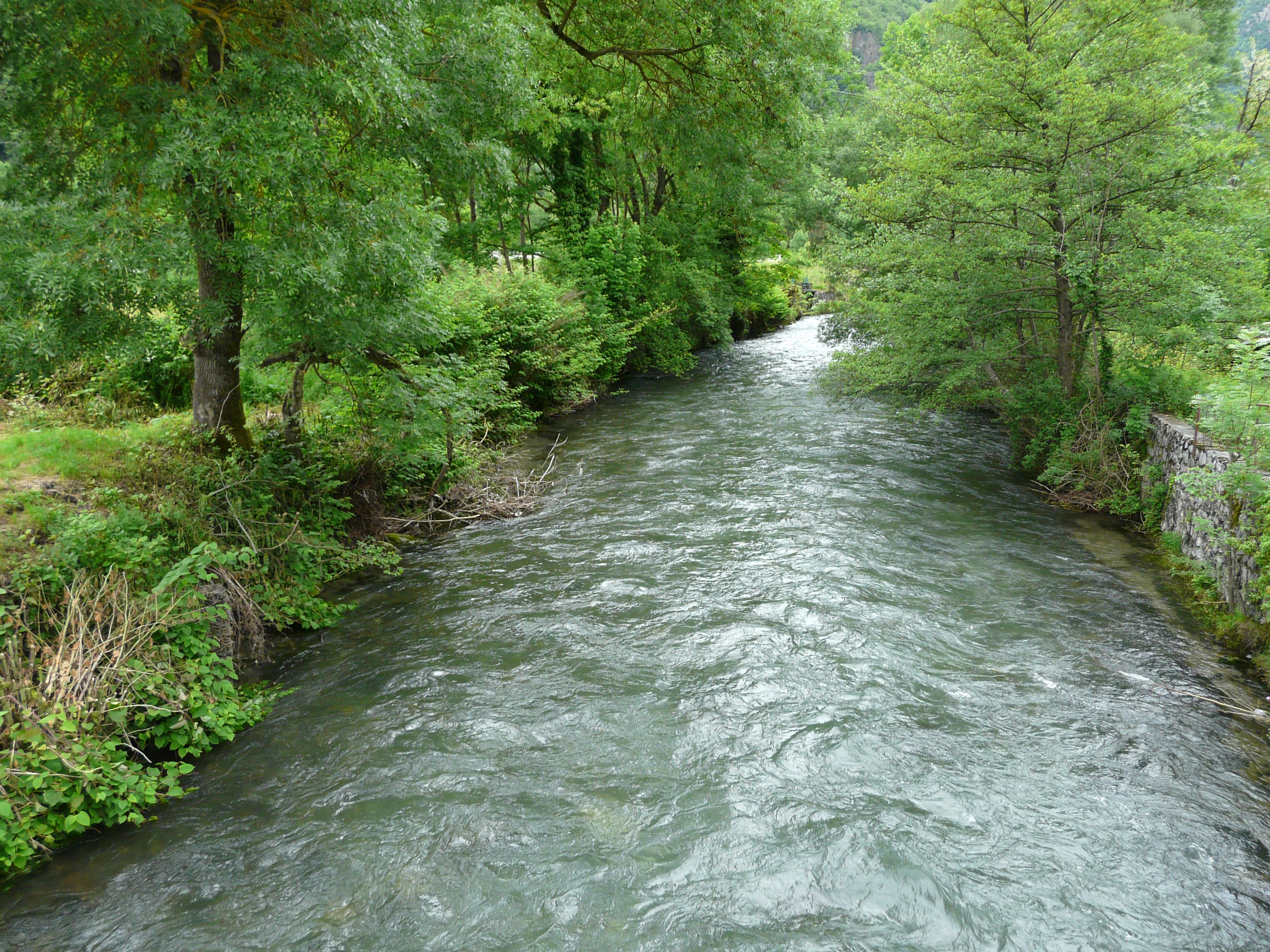 La Pique en aval du pont de la route départementale 27b, en limites d'Antignac (à gauche) et Salles-et-Pratviel (à droite), Haute-Garonne, France.